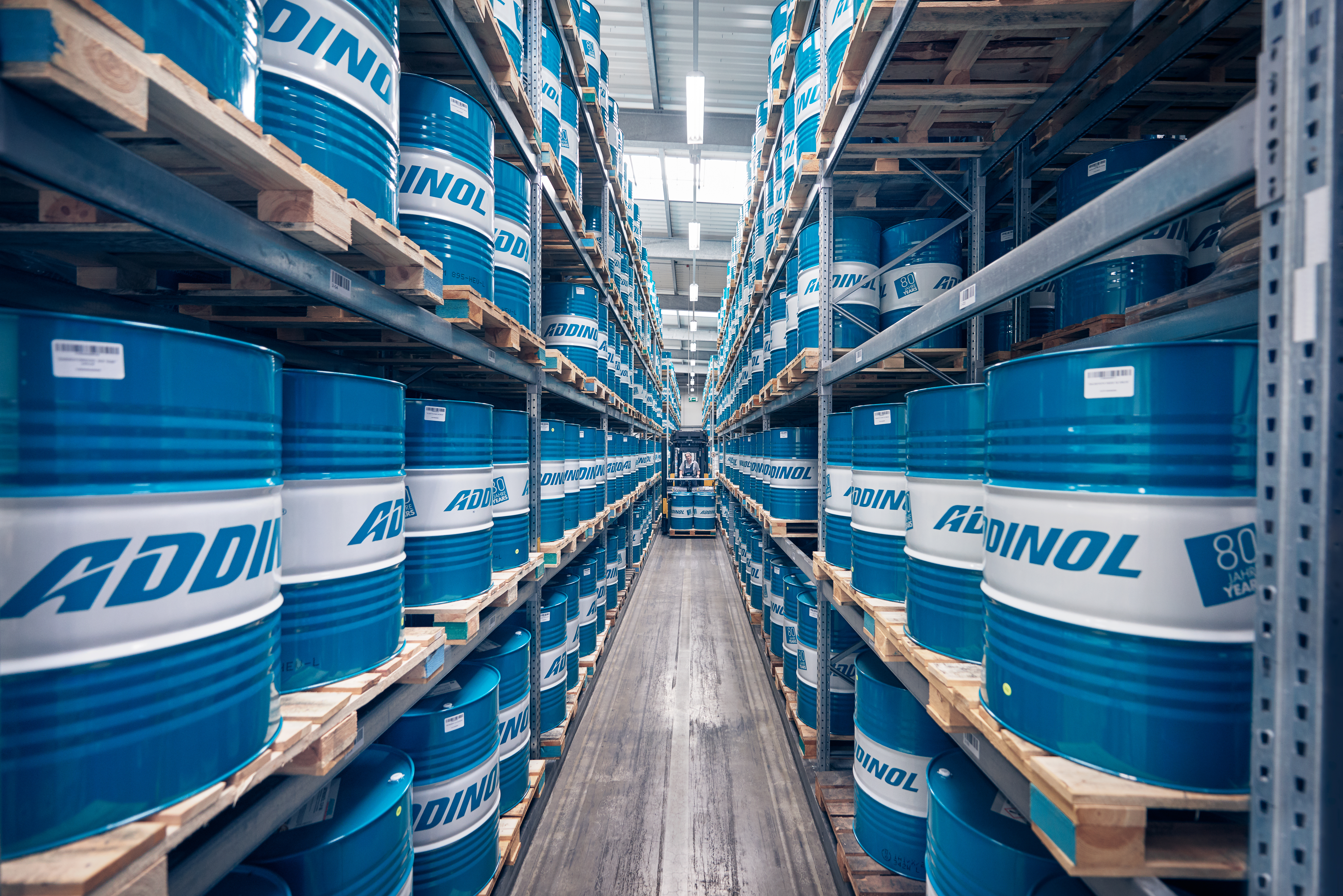 Eingelagerter Schmierstoffdrums von ADDINOL